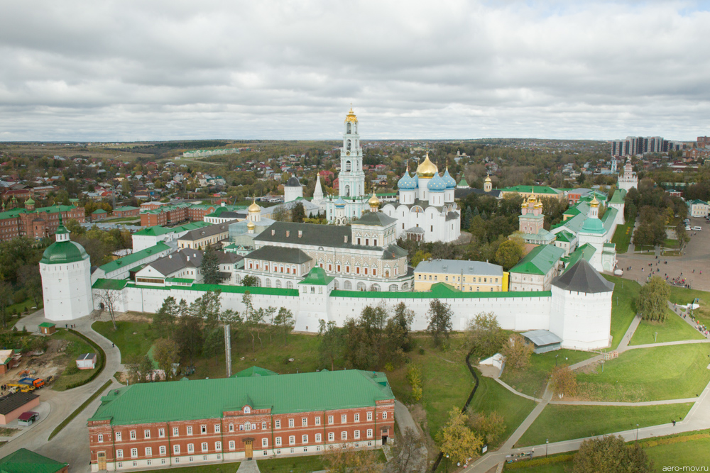 Фотография Троице-Сергиевой лавры с высоты птичьего полета. Кадр сделан в начале октября 2015 года.